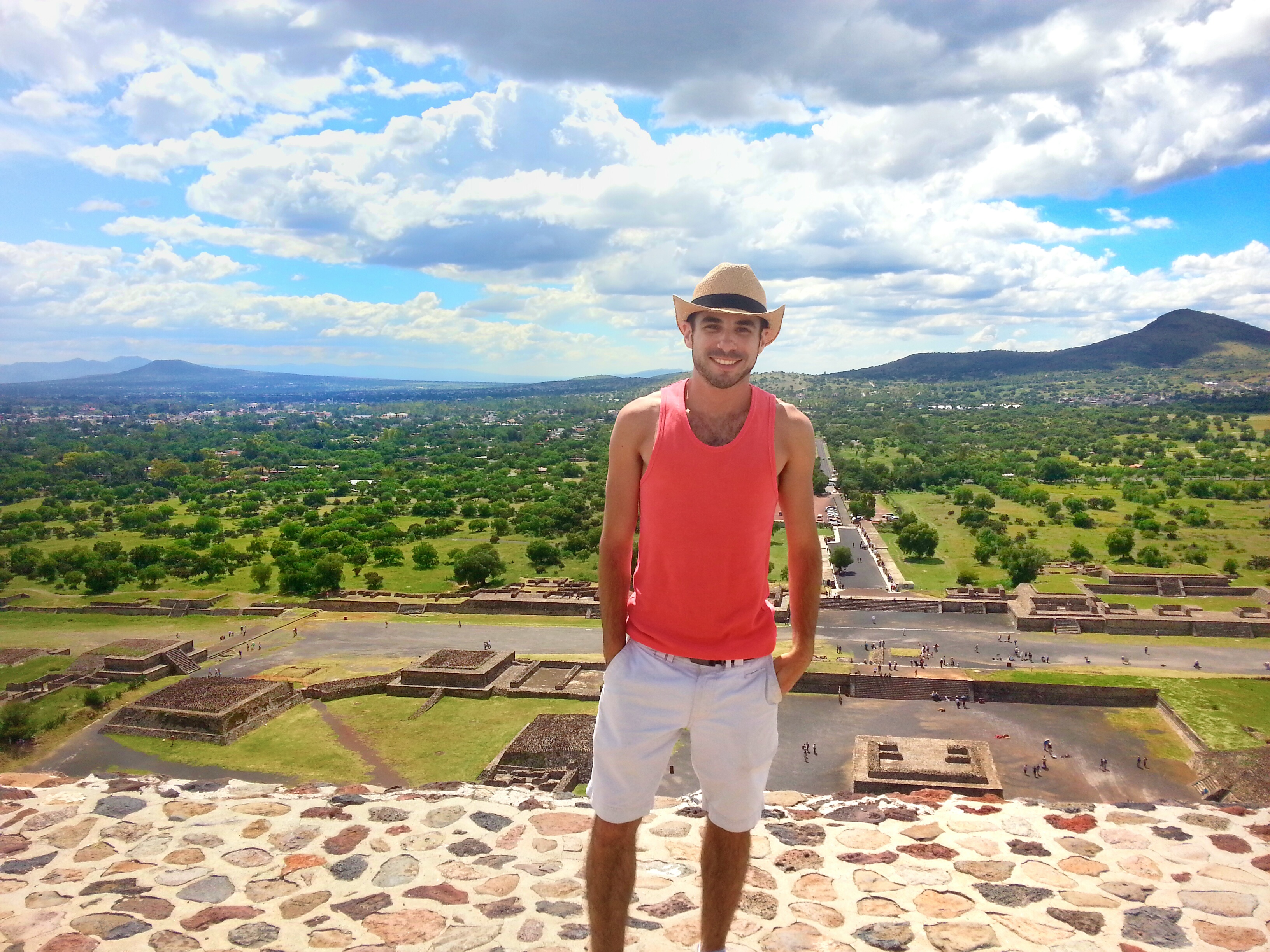 Photographer: Dekel Lazimi Lev